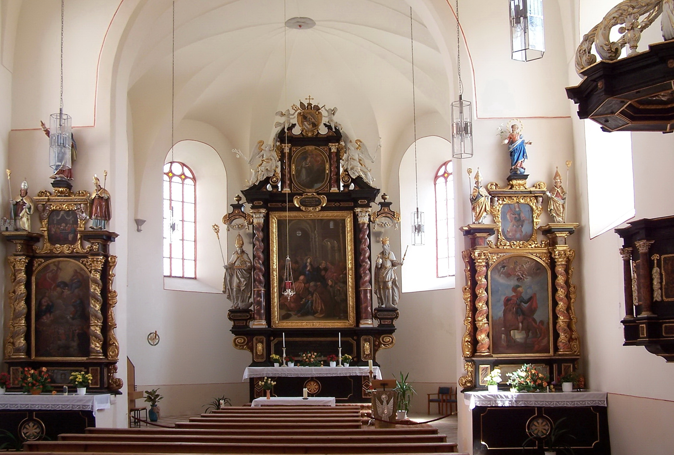 Wörth an der Donau. Schlosskapelle St. Martin. Im Chor und Langhaus gratige Kreuz- bzw. Kappengewölbe auf Renaissancekonsolen. Im Chor an der Stelle von Schlusssteinen zwei stuckierte flache Rosetten. Runder Chorbogen mit Fasung. Fenster rundbogig, dreigeteilt mit spätestgotischem Maßwerk, das an der südlichen Schrägseite fehlt. Langhausfenster ohne Maßwerk.